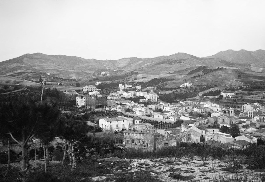 Imatge